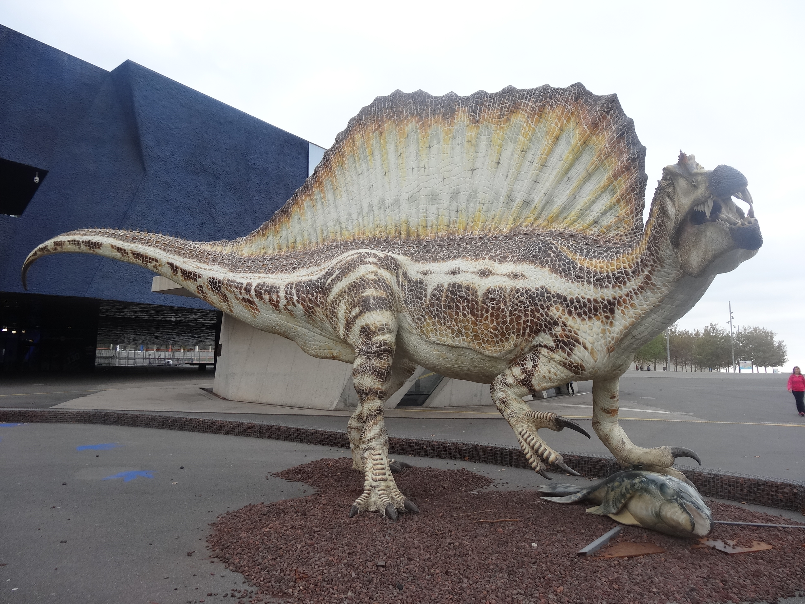 Spinosaurus - Museu Blau - Octubre 2016